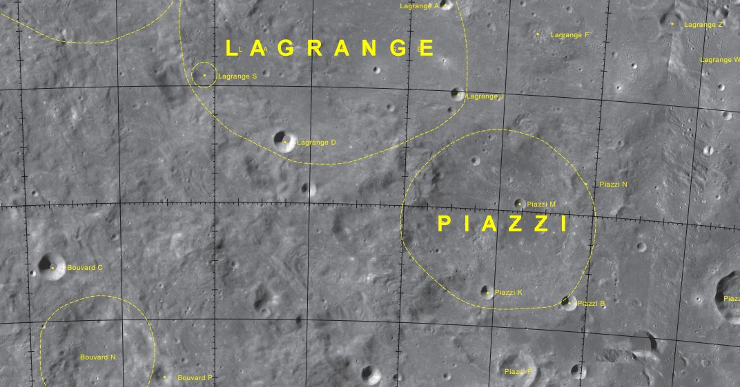 Cráter lunar Piazzi. Localización. (Imagen LRO)